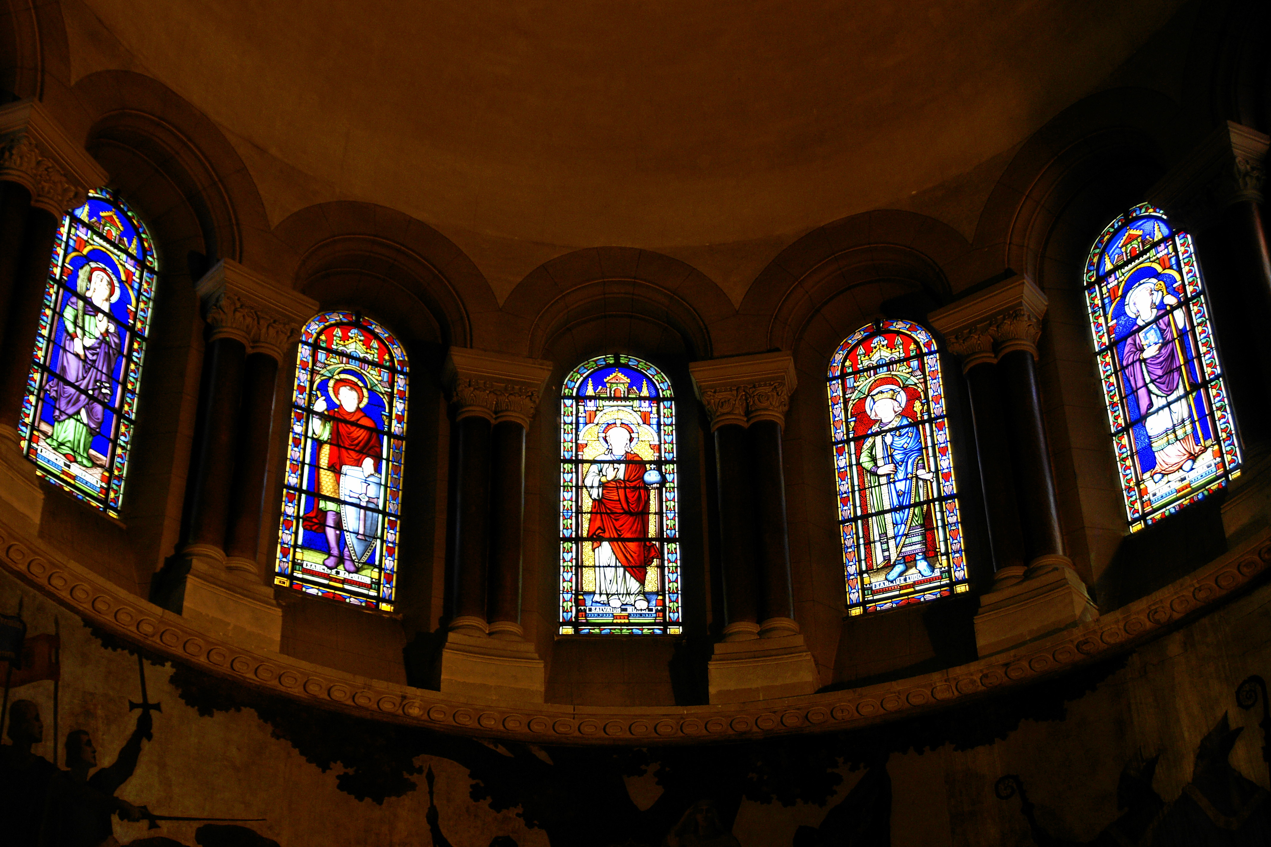 Église Saint-Louis de Vichy: Glasfenster im Chor